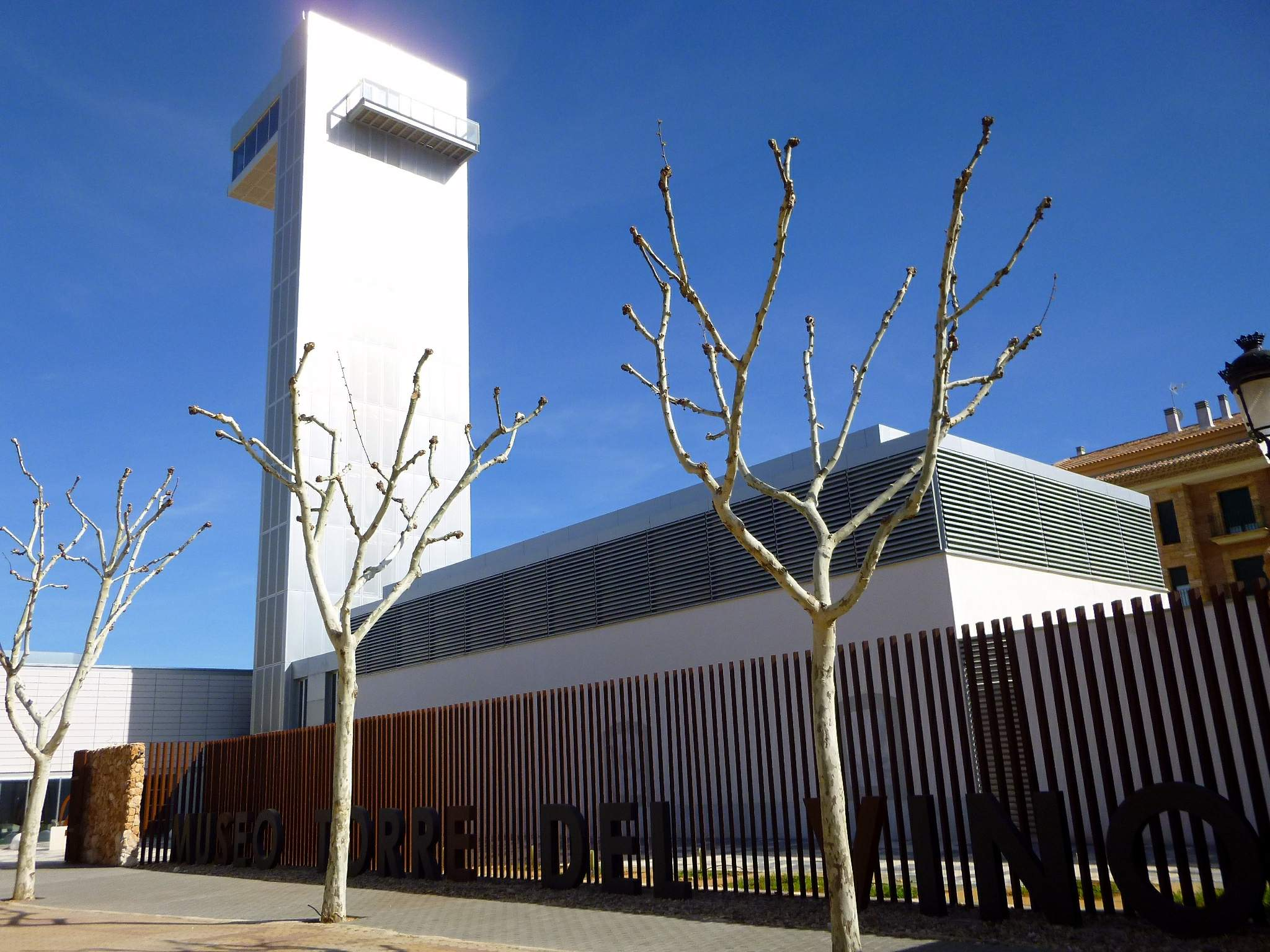 Museo Torre del Vino (Socuéllamos, Ciudad Real)